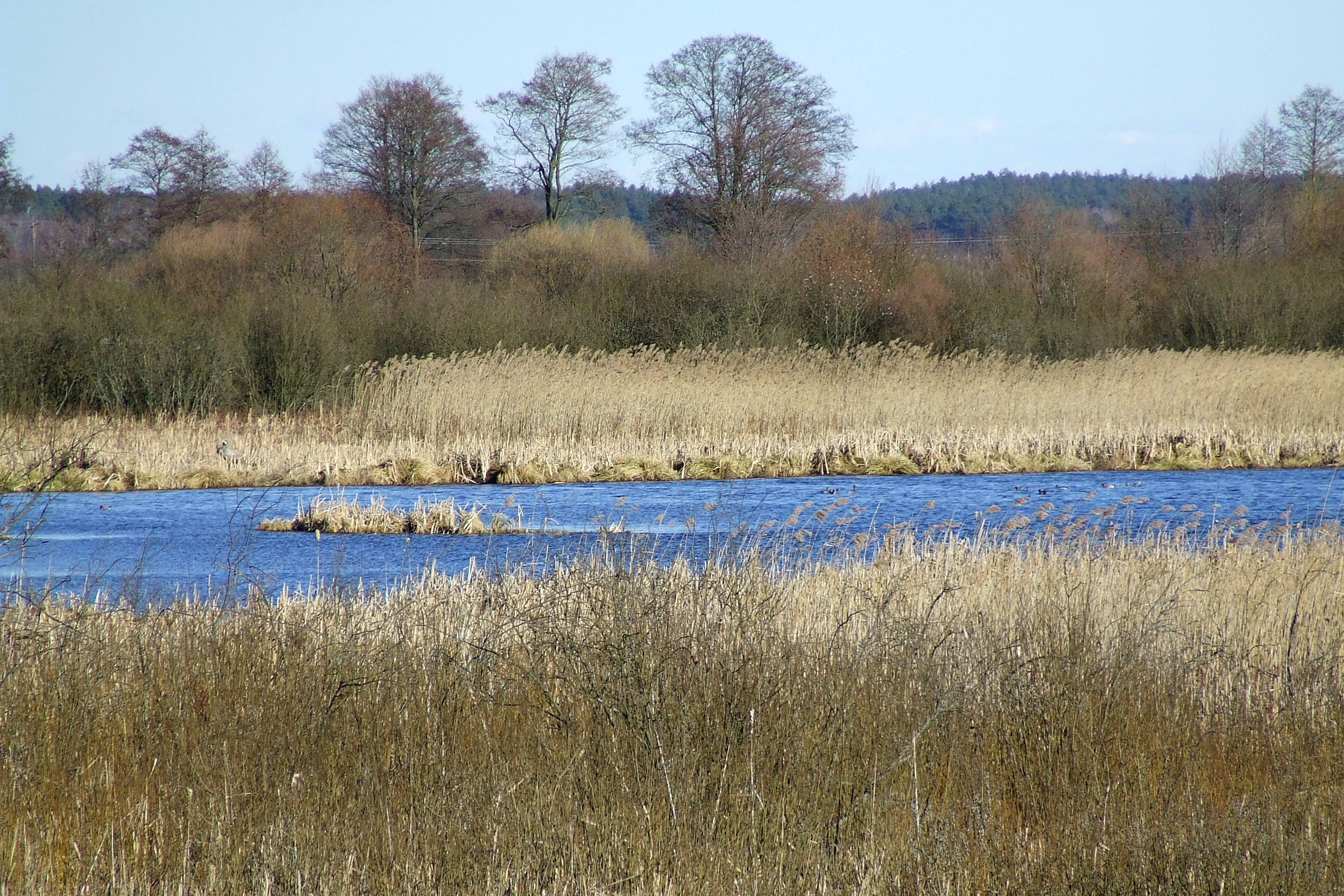 Jezioro Łacha (powiat kolneński)